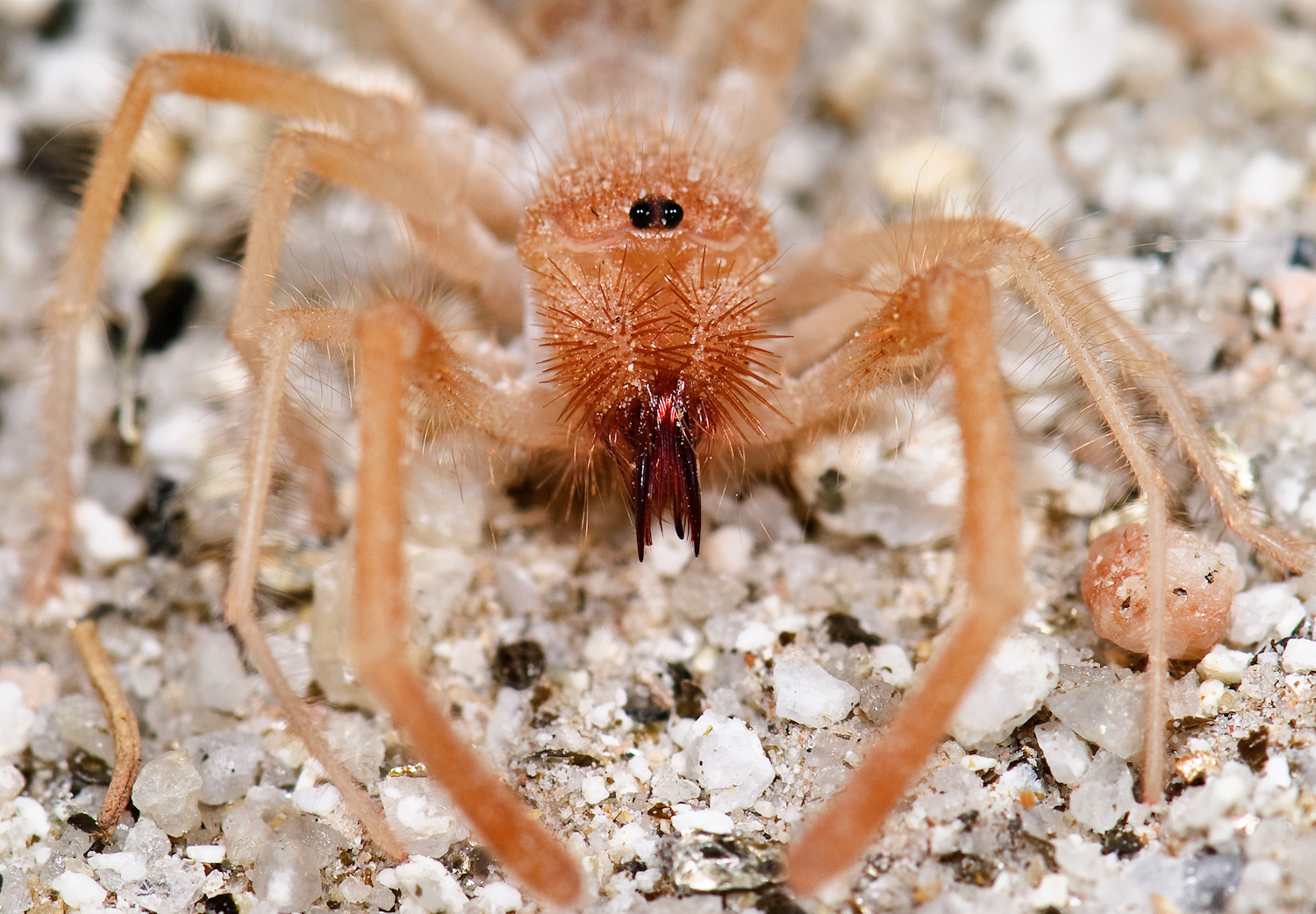 Arachnida, Solifugae